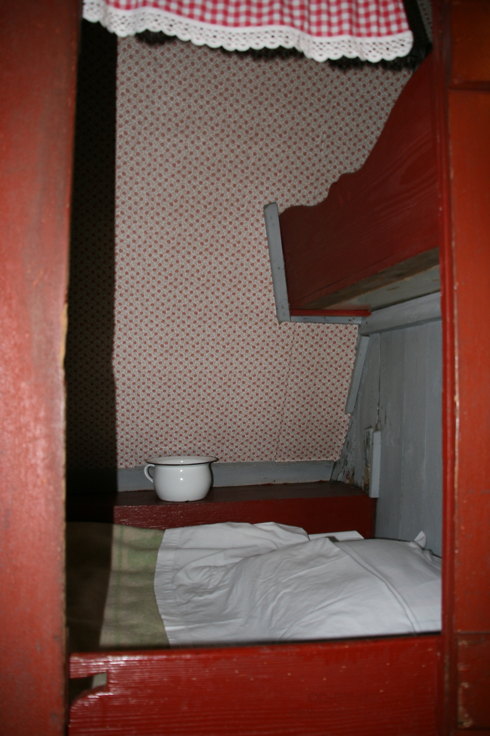 Langerak: de Westermolen - bedstede met kribje